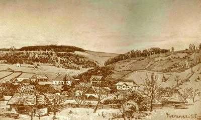 Baranski László grafika Dálnokról, Romániában?